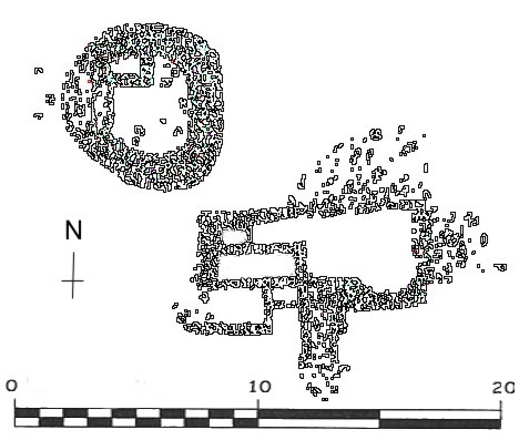 Dibujo basado en el diagrama de Antonio Beorchia de 1975